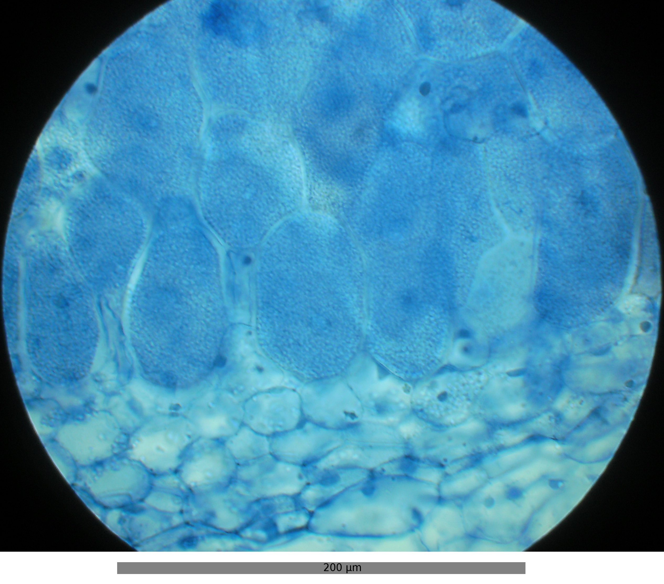 Querschnitt durch Wurzelknöllchen der Wicke (Vicia spec.); Fixierung: Formaldehyd; Färbung: Gentianaviolett - Iod (angelehnt an Gramfärbung); Vergrößerung: 400fach; Unten im Bild ist ein Streifen des das Wurzelknöllchen umgebenden Abschlussgewebes zu sehen, darüber liegt das großzellige Gewebe des eigentlichen Wurzelknöllchens, in das die als kleine Kugeln sichtbaren stickstoffixierenden Bakterien eingelagert sind.